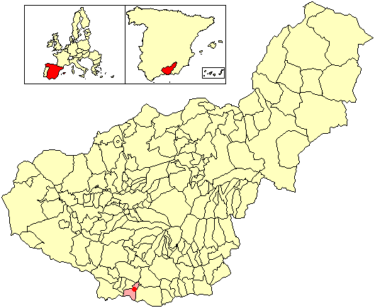 Situación de la localidad de Lobres (en el municipio de Salobreña) respecto a la provincia de Granada, en España.